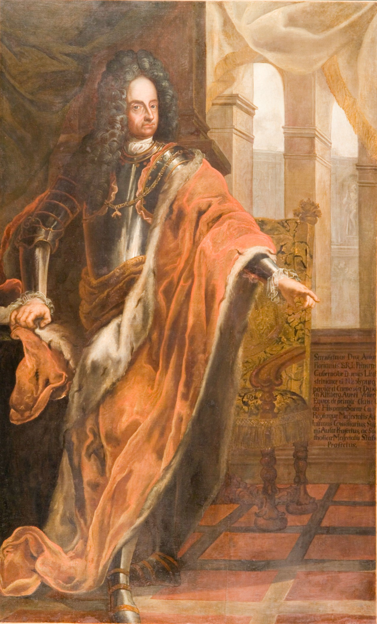 Fechet Laurentiu von Liechtenstein (Antonio Florián). Príncipe de Liechtenstein (1719-1721)